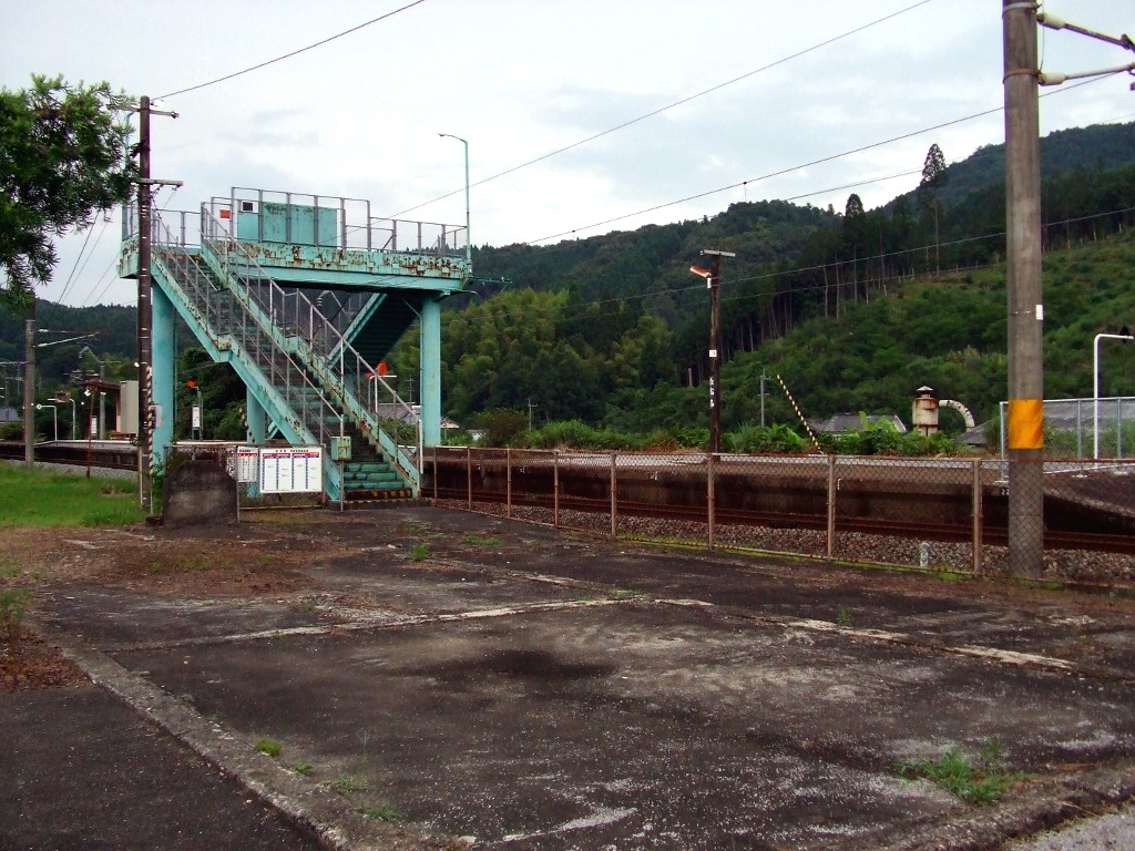 直見駅舎跡（2009年7月3日撮影）